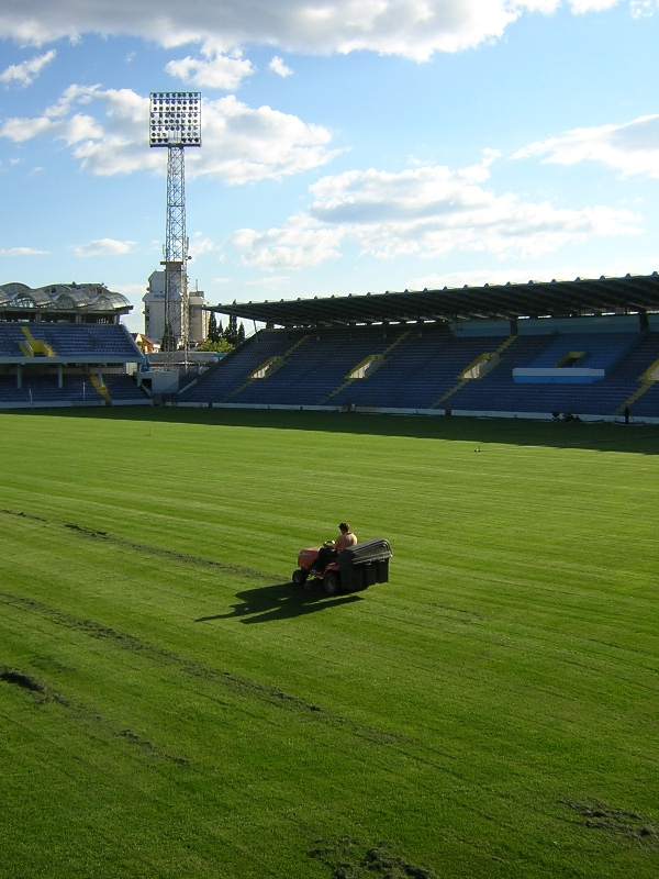 Podgorica